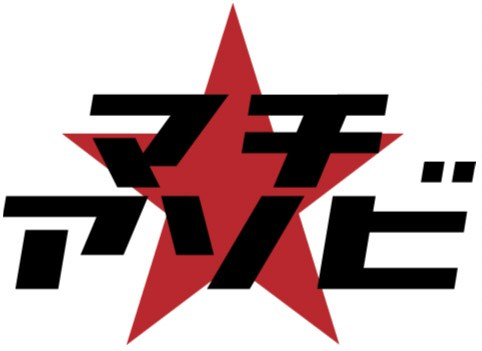 マチ★アソビのロゴマーク。